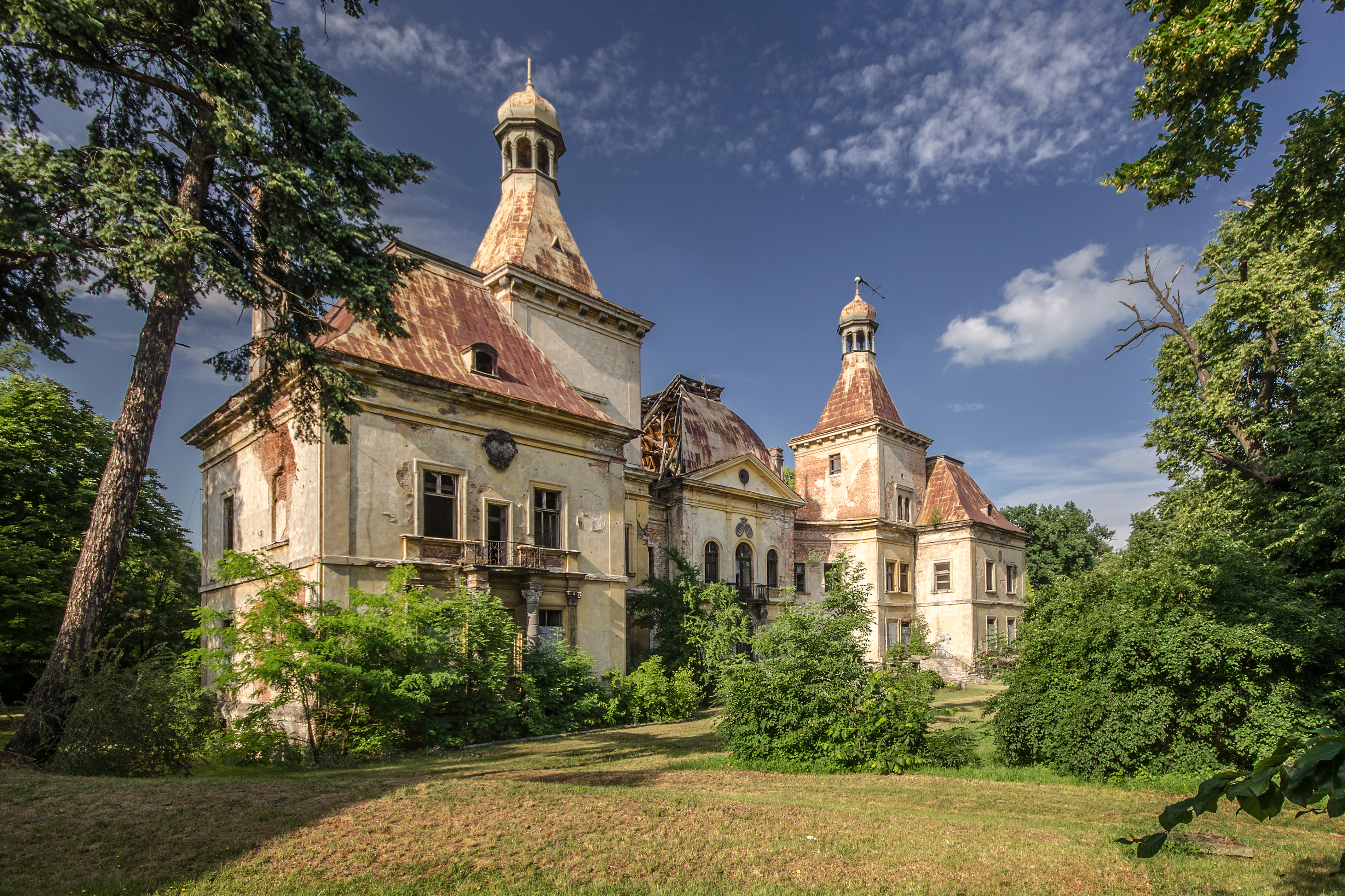 Mańczyce, pałac, 1 poł. XVIII, 2 poł. XIX